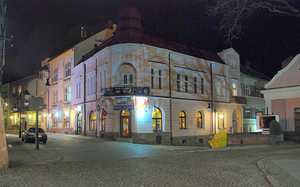 Hotel Orbis w Krośnie. Autorem zdjęcia jest Przemysław Niepokój-Hepnar.